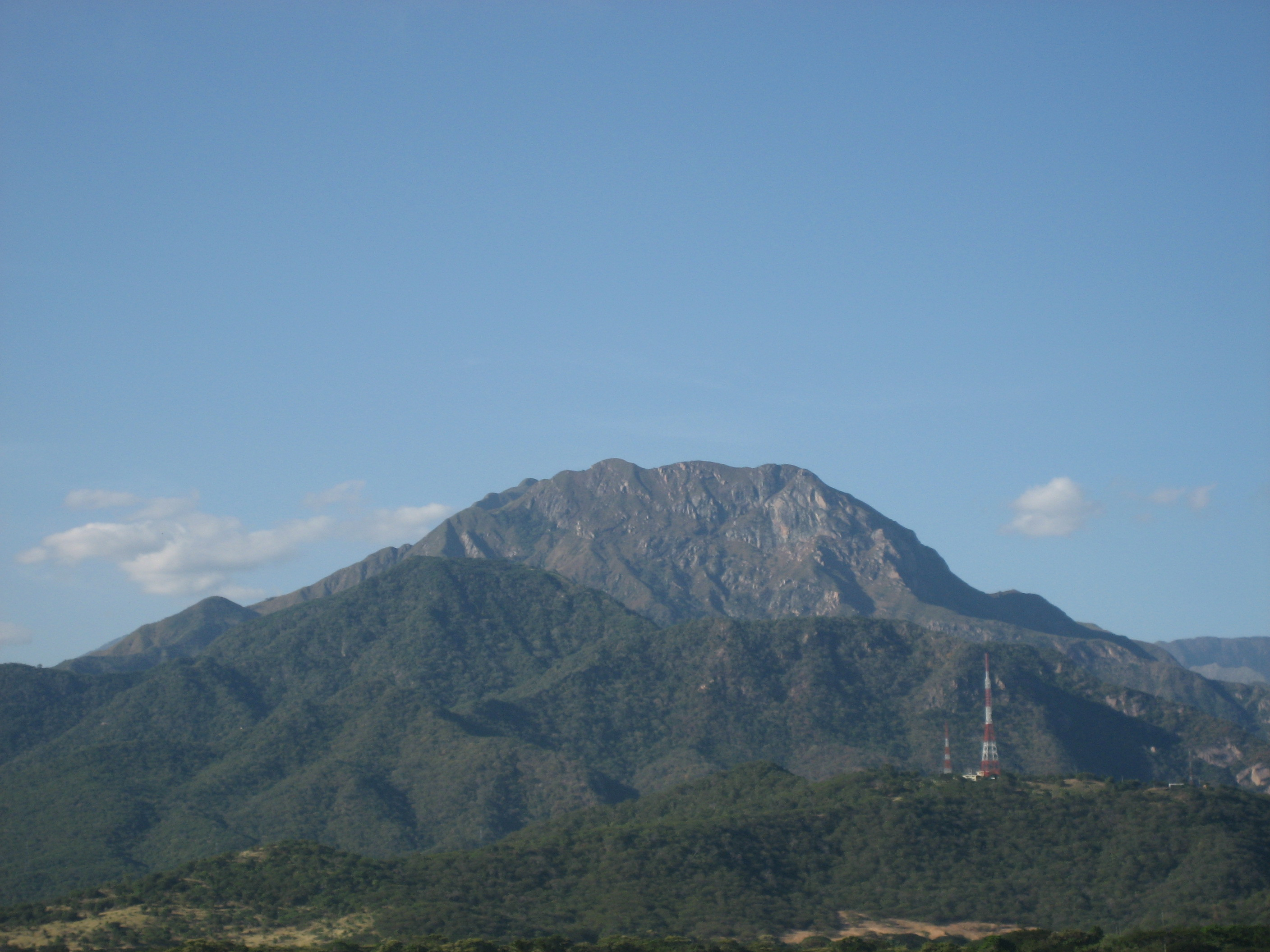 Cerro Murillo - Sierra Nevada de Santa Marta. Valledupar, Colombia.